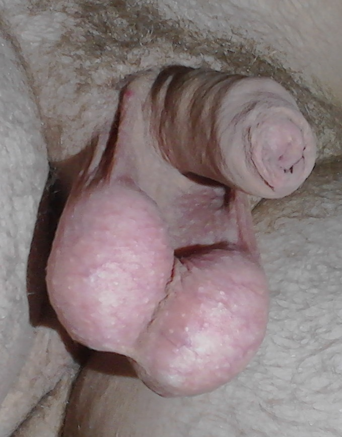 Genitália masculina externa, pênis e saco escrotal